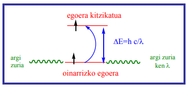 Kolorea egoera kitzikatu eta oinarrizko egoeraren araberakoa